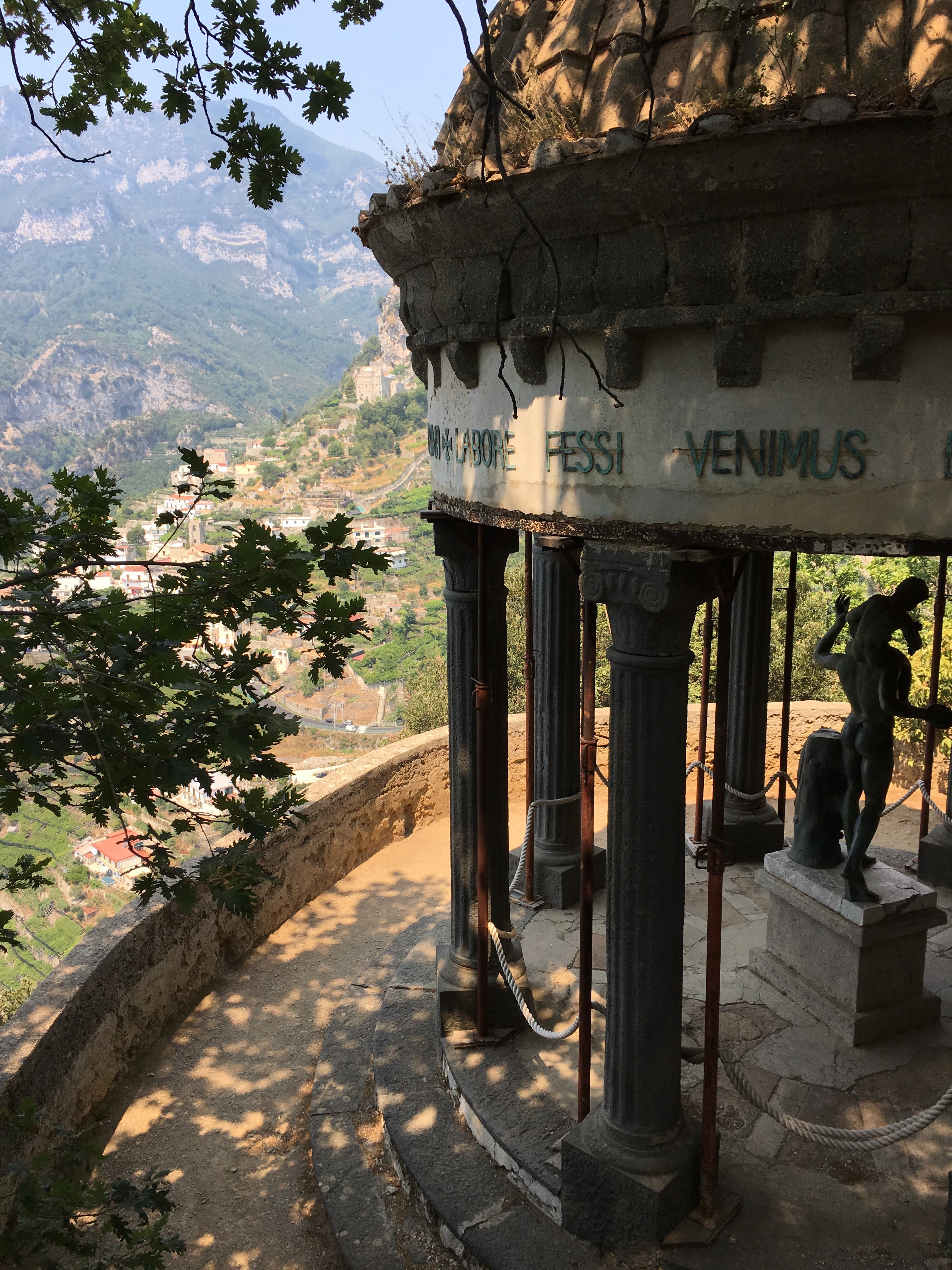 Ravello. Villa Cimbrone. Templete de Baco.